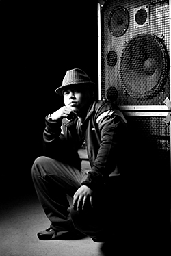 Martin Jondo, fotografiert von foto di matti in Berlin